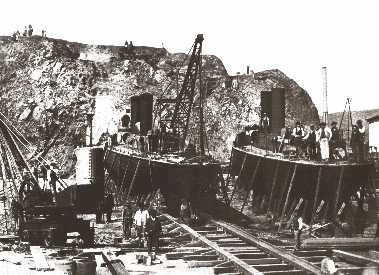 Torpederas en construcción en Viña del Mar en 1898